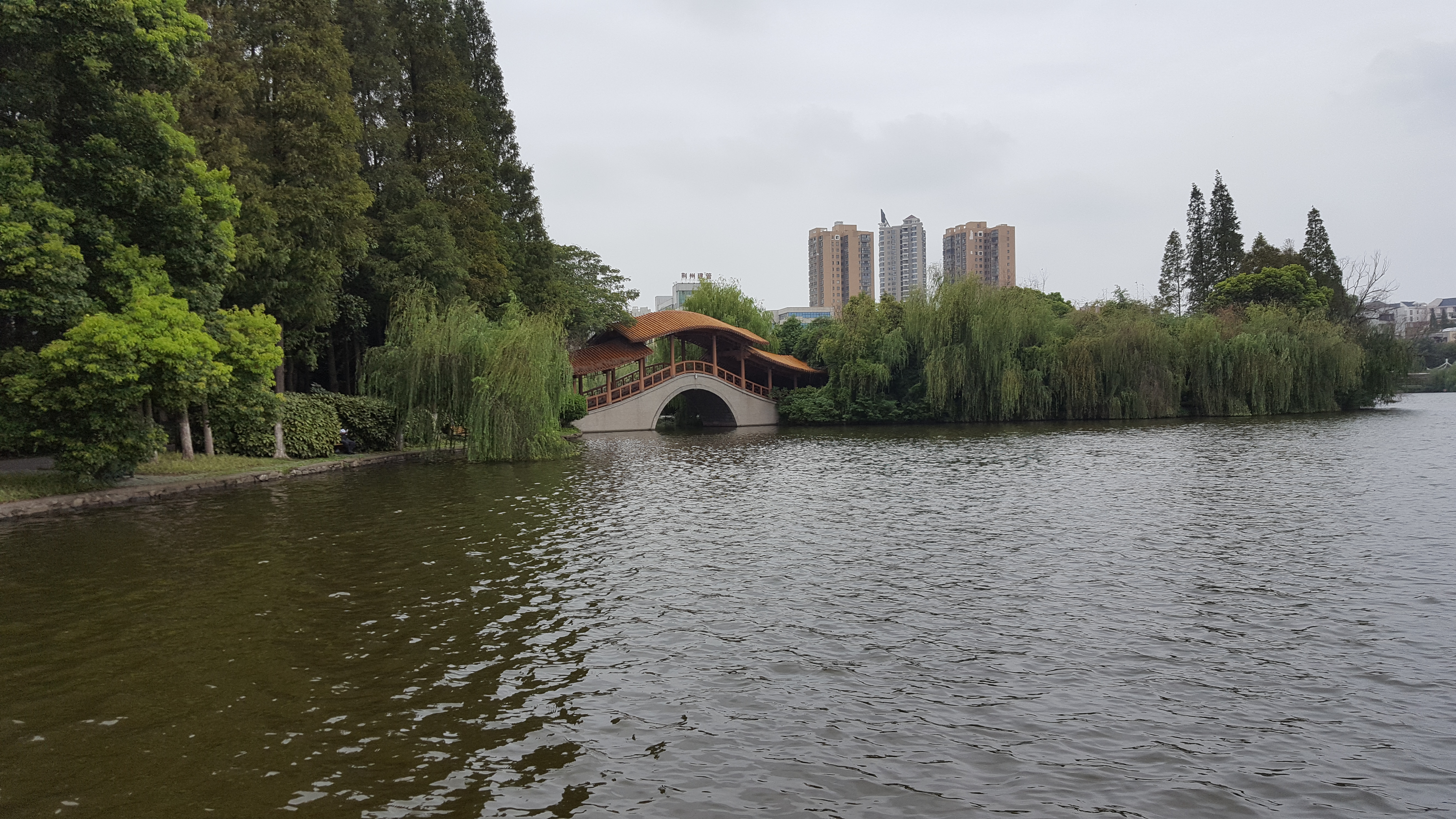 中文（中国大陆）: 荆州市沙市市中山公园江津湖和桥